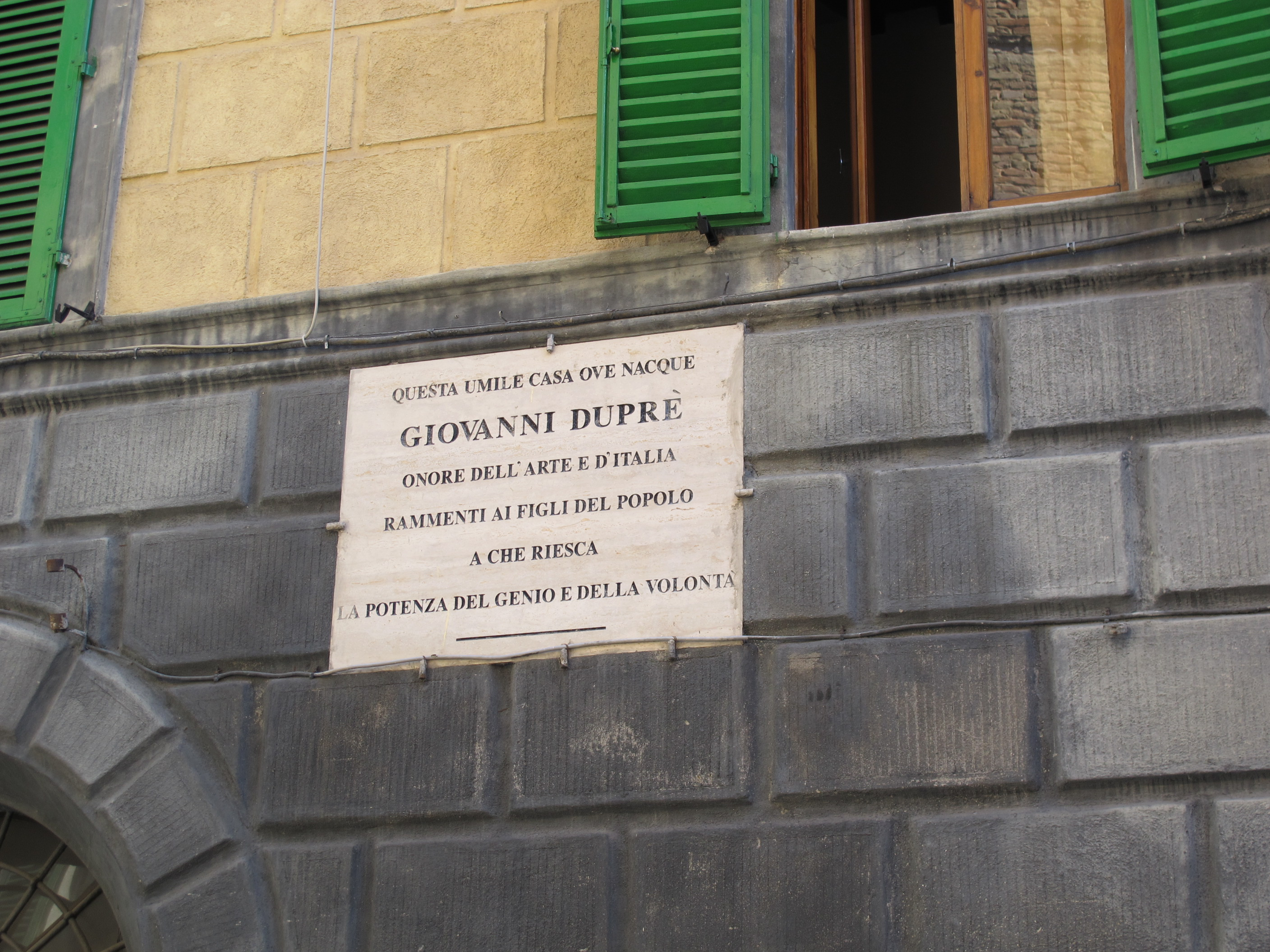 Targa casa natale di giovanni duprè, via g. duprè